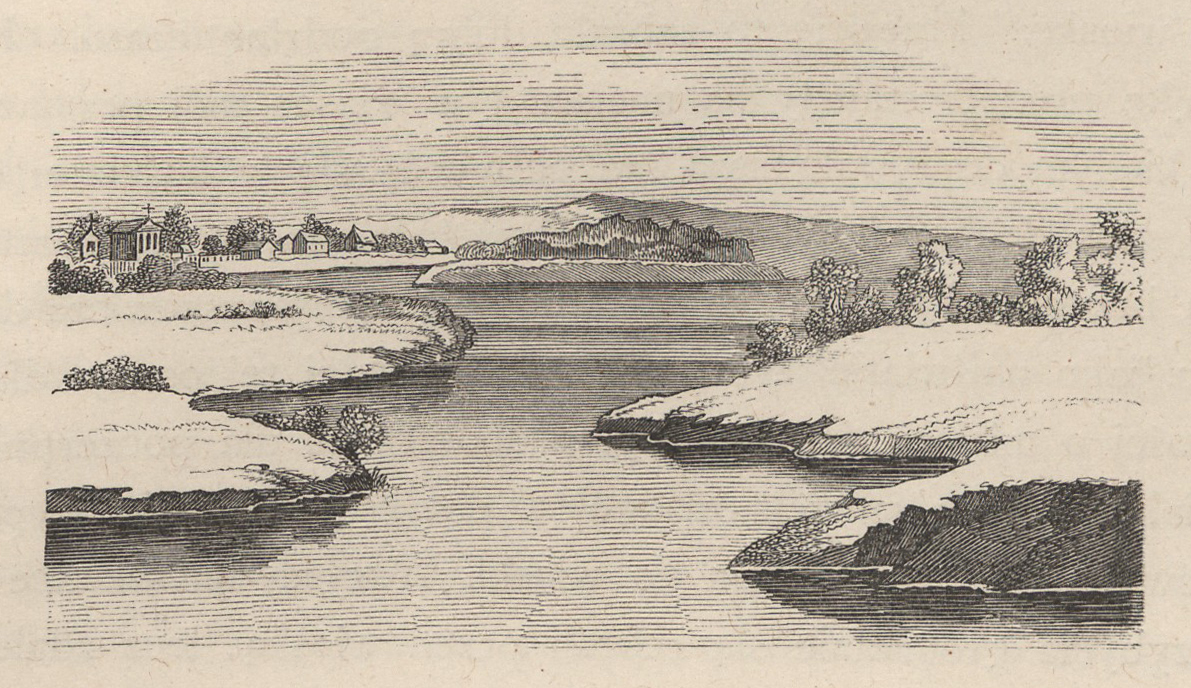 Беларуская (тарашкевіца): Данюшава (Daniušava), рака Вяльля (Vialla)